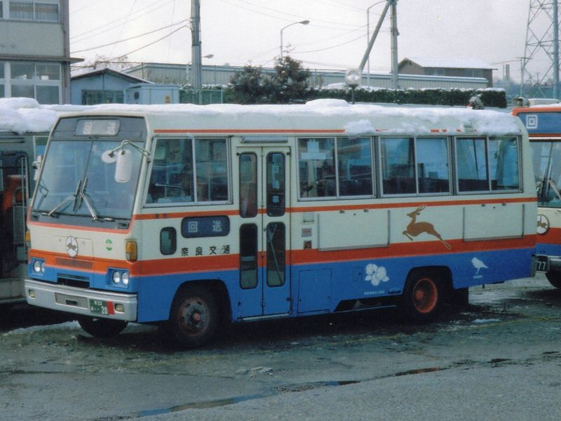 Nara Kotsu Isuzu K-DBR370 at Oyodo Bus Terminal